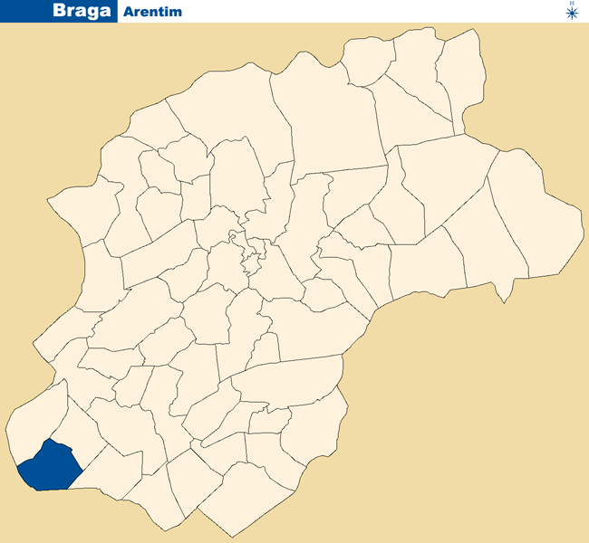 Localização de Arentim no concelho bracarense (Braga).